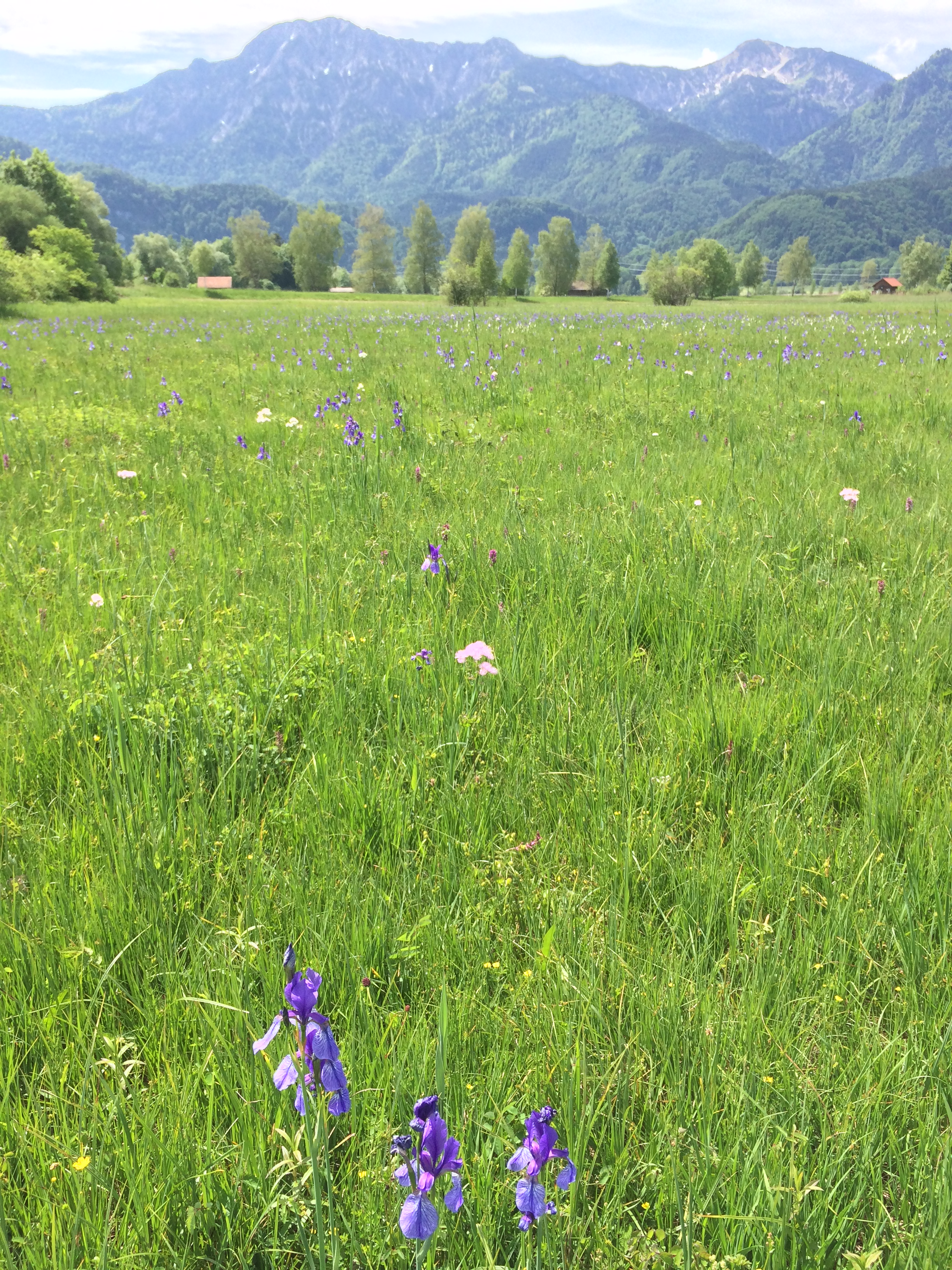 FFH-Gebiet Loisach-Kochelsee-Moore mit Schwertlilien, Iris sibirica, im Hintergrund Herzogstand und Heimgarten